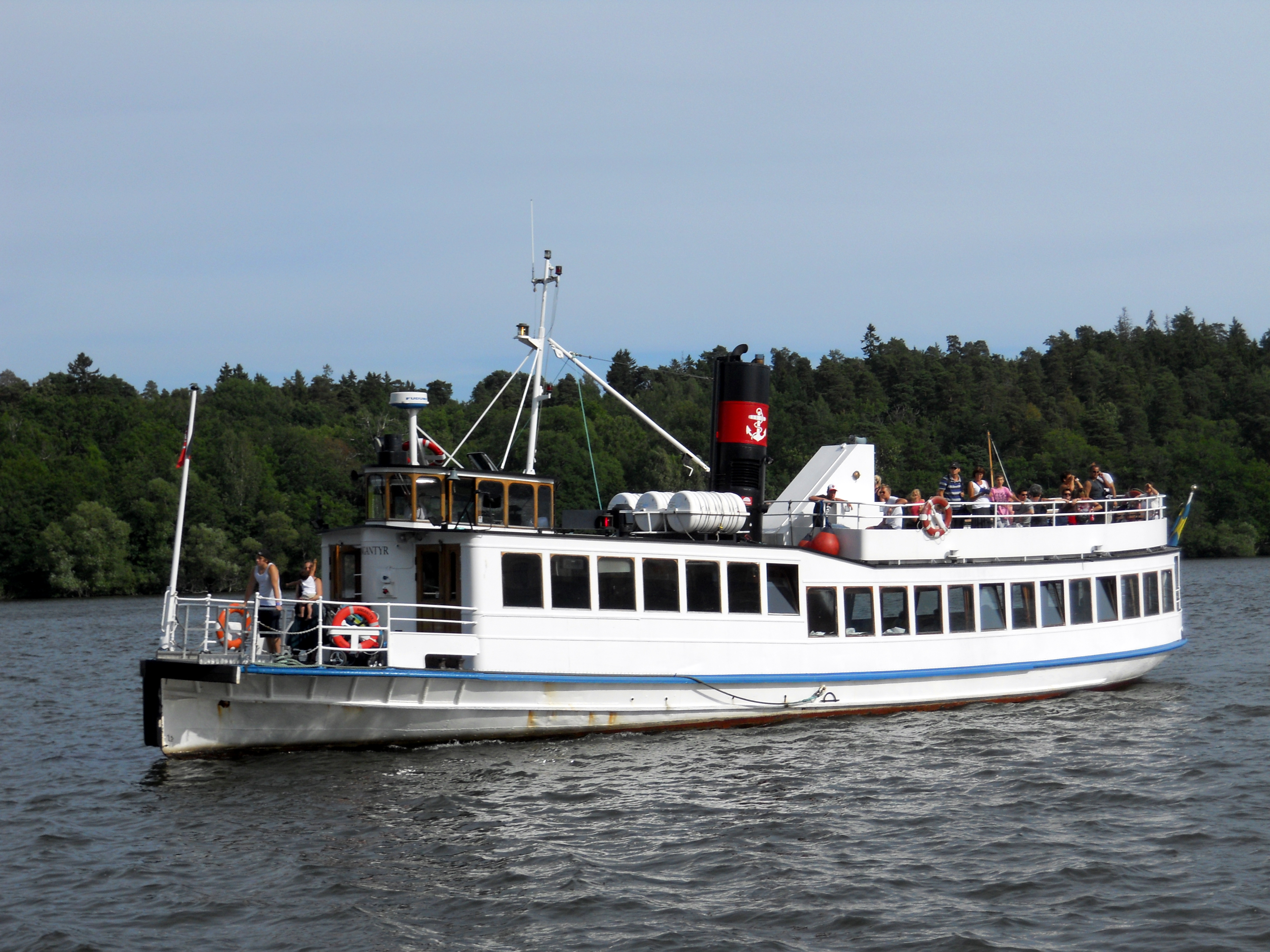 M/S Angantyr närmar sig Drottningholms brygga. This is an image of the protected Swedish ship M/S Angantyr, with call sign SDCI .